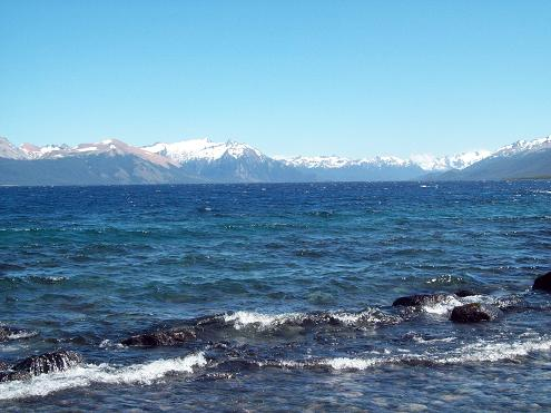 Lago Vintter desde su cabacera este, en la Argentina. Al fondo, las altas cumbres que dividen este país de Chile.